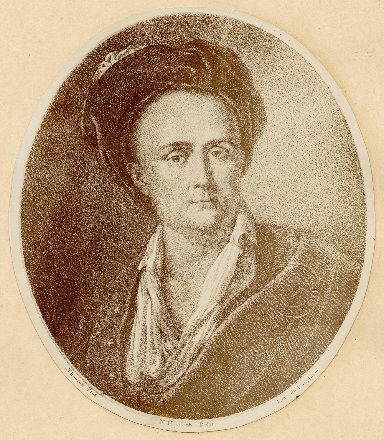 Charles-Joseph Panckoucke (Portrait de Thouron, dessiné par N. H. Jacob, lithographié par Langlumé). 1875-1900